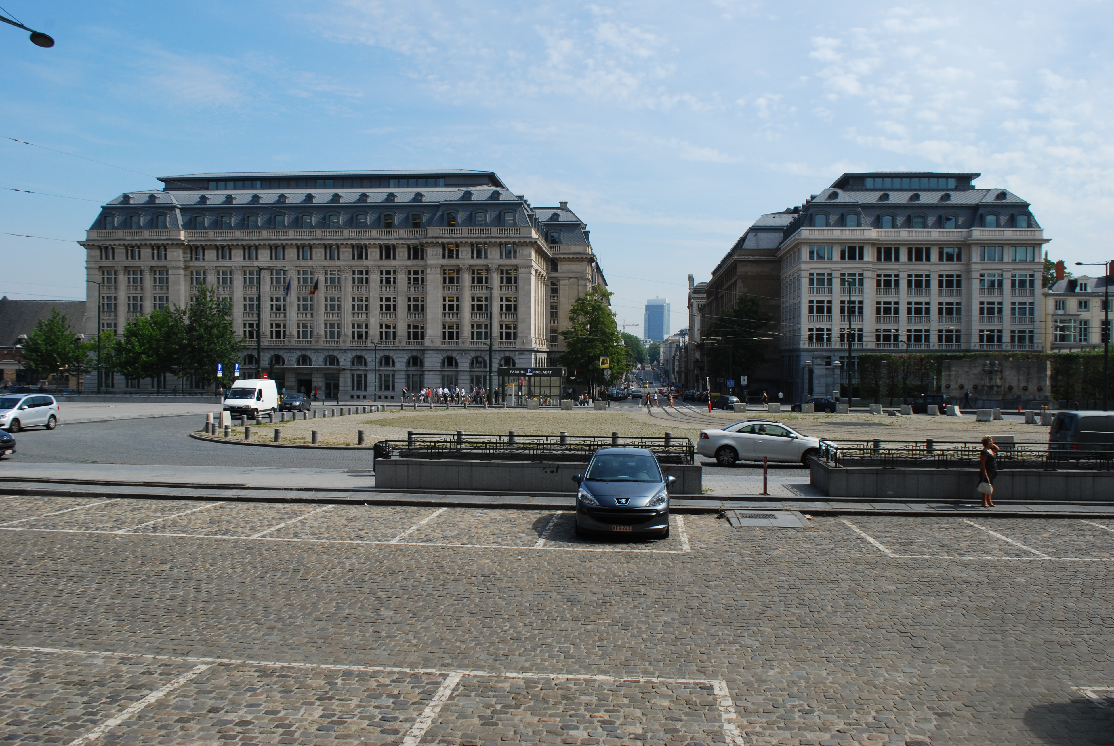 La place Poelaert à Bruxelles ; au centre, perspective vers la rue de la Régence.